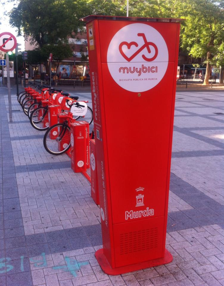 Servicio municipal de alquiler de bicicletas de la ciudad de Murcia (Región de Murcia, España)